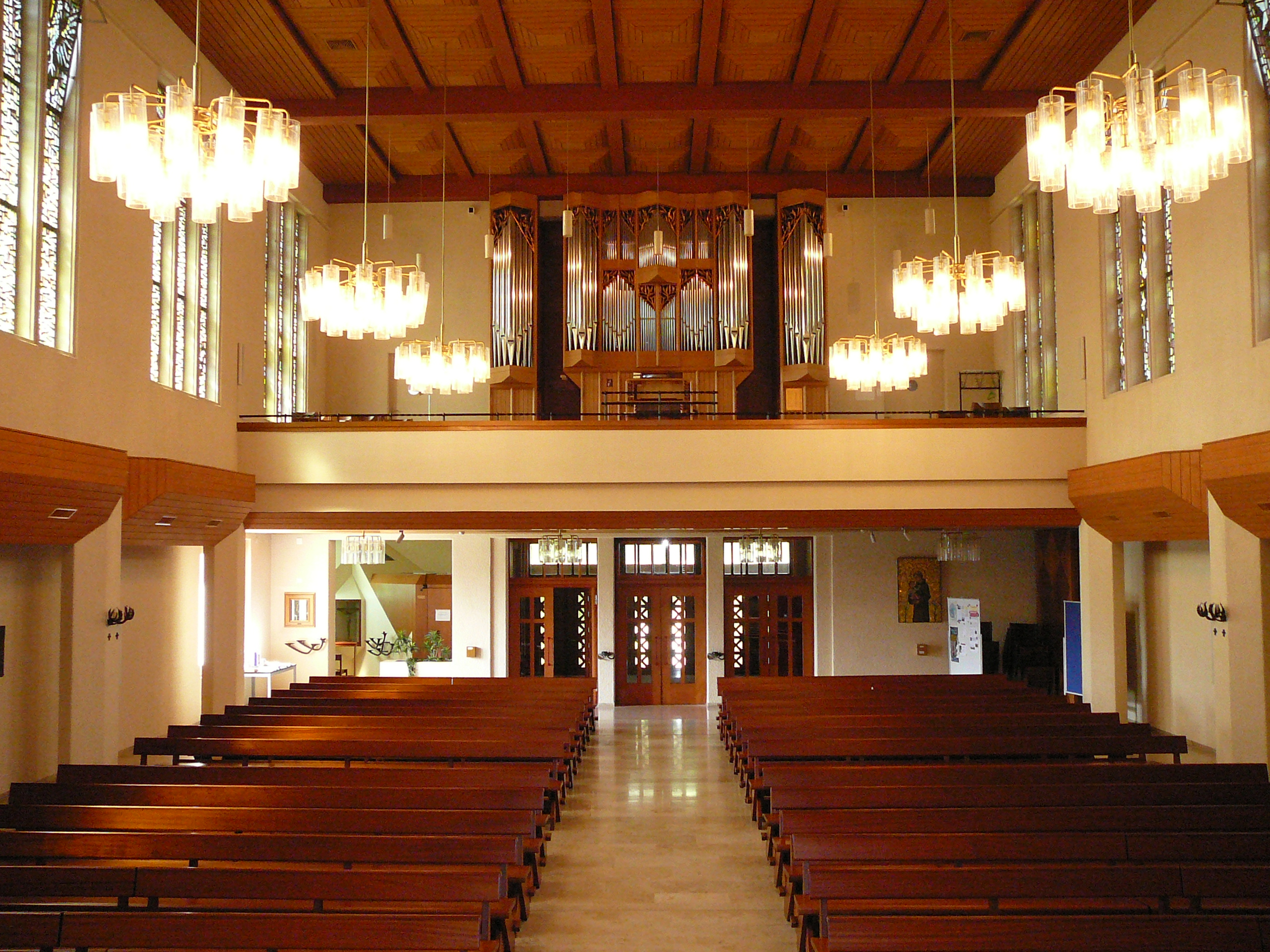 Römisch-katholische Kirche Erlöser Zürich-Riesbach, Blick zur Mathis-Orgel